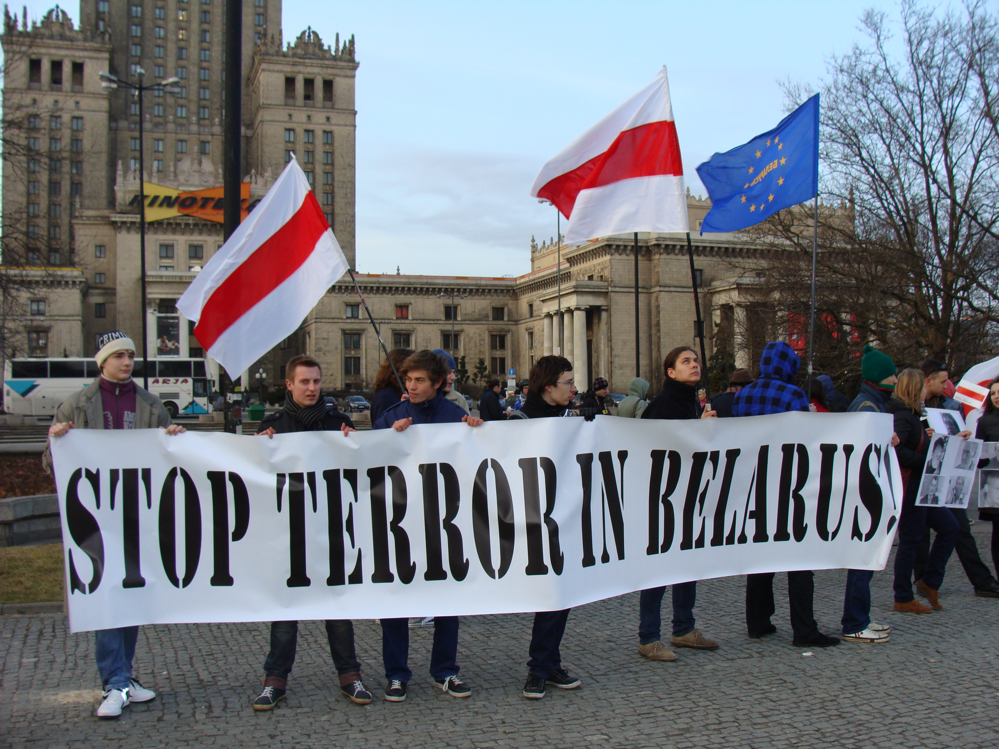 Dzień Solidarności z Białorusią. Wśród uczestników byli stypendyści Programu Stypendialnego im. Konstantego Kalinowskiego, aktywiści "Europejskiej Białorusi" i Inicjatywy Wolna Białoruś. Akcja odbyła się pod Pałacem Kultury i Nauki w Warszawie od strony Alej Jerozolimskich. 16 marca 2011 r.